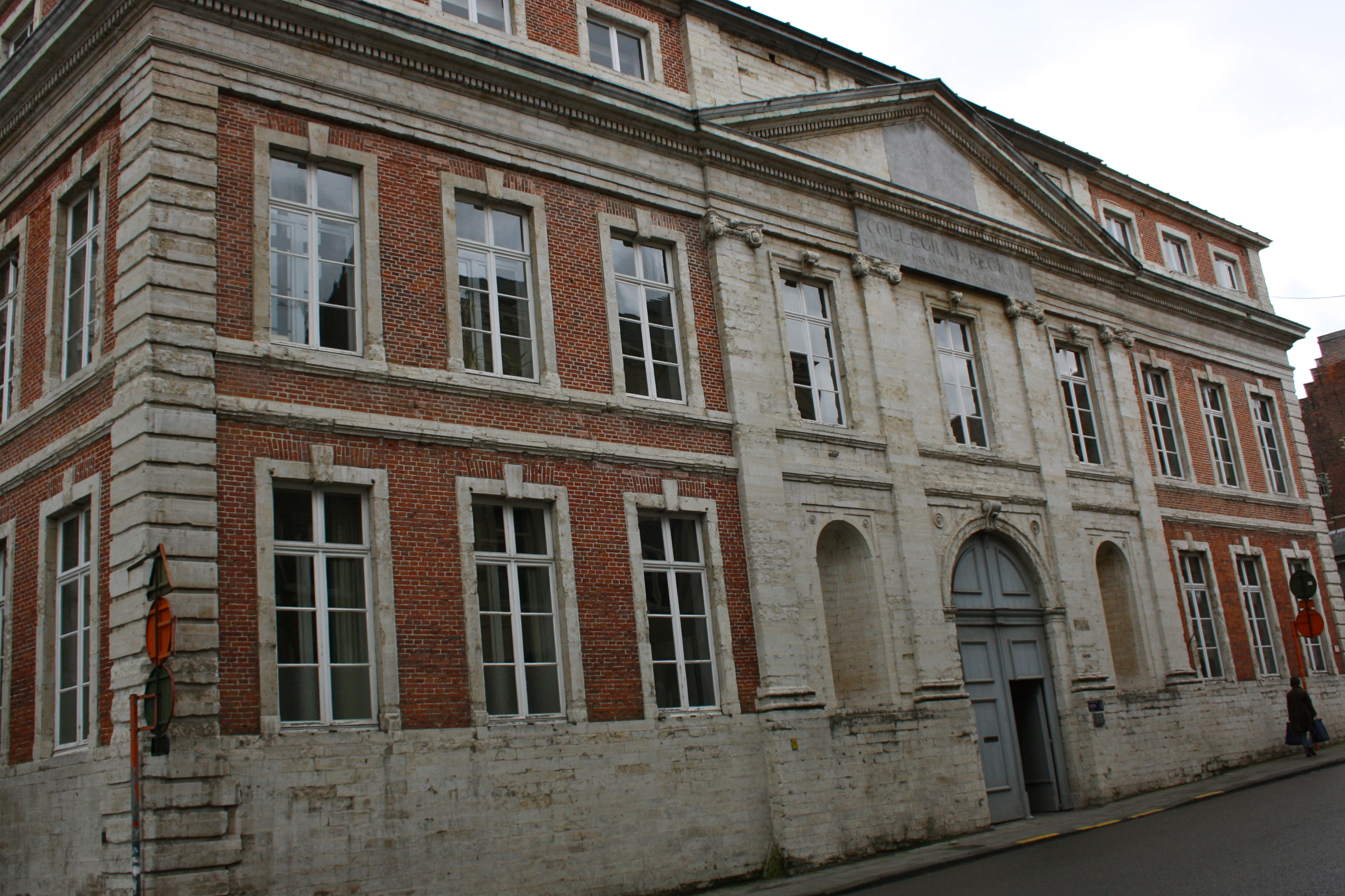 Koningscollege, Naamsestraat 59, Leuven.